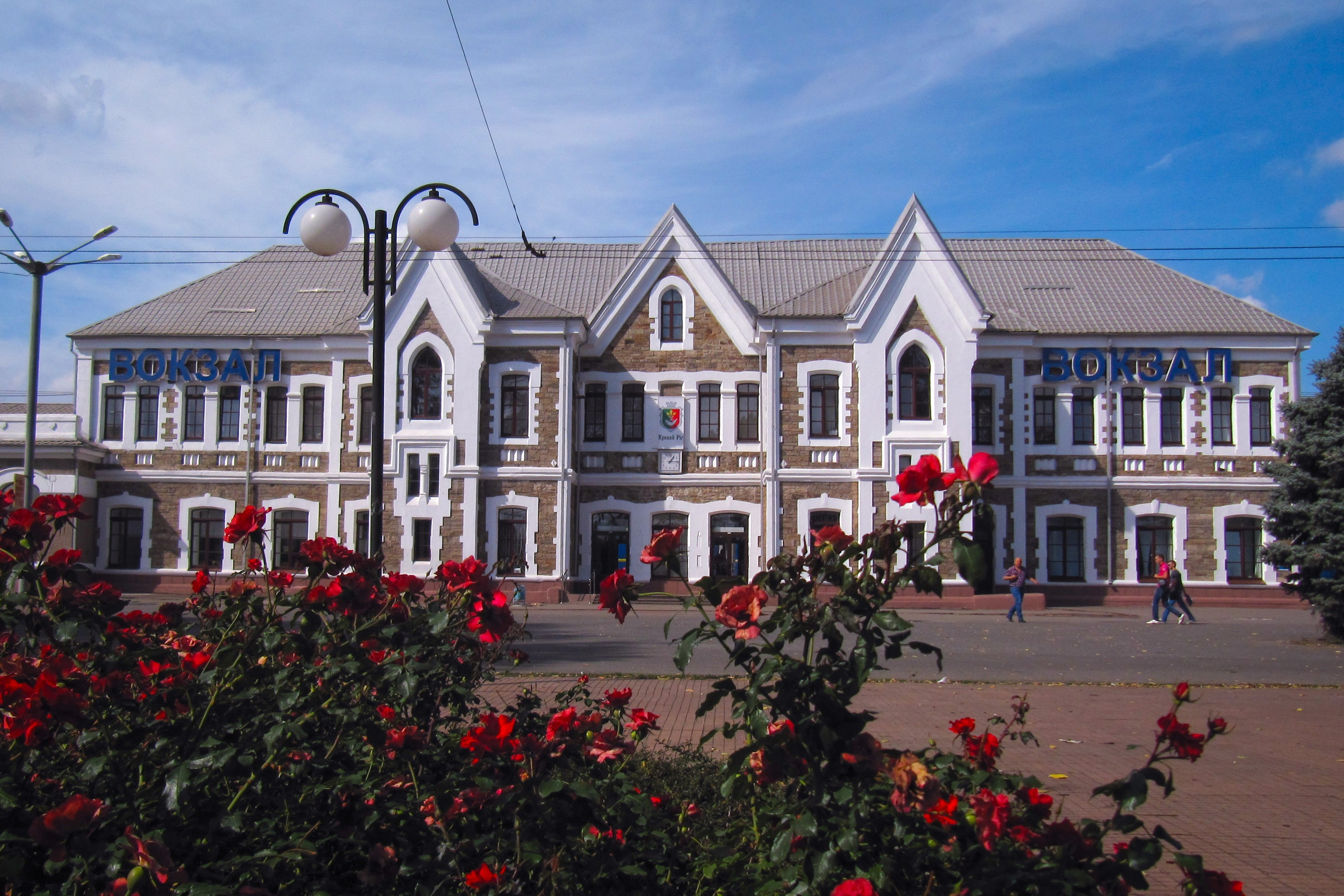 Будівля вокзалу «Станція Кривий Ріг-Головний»